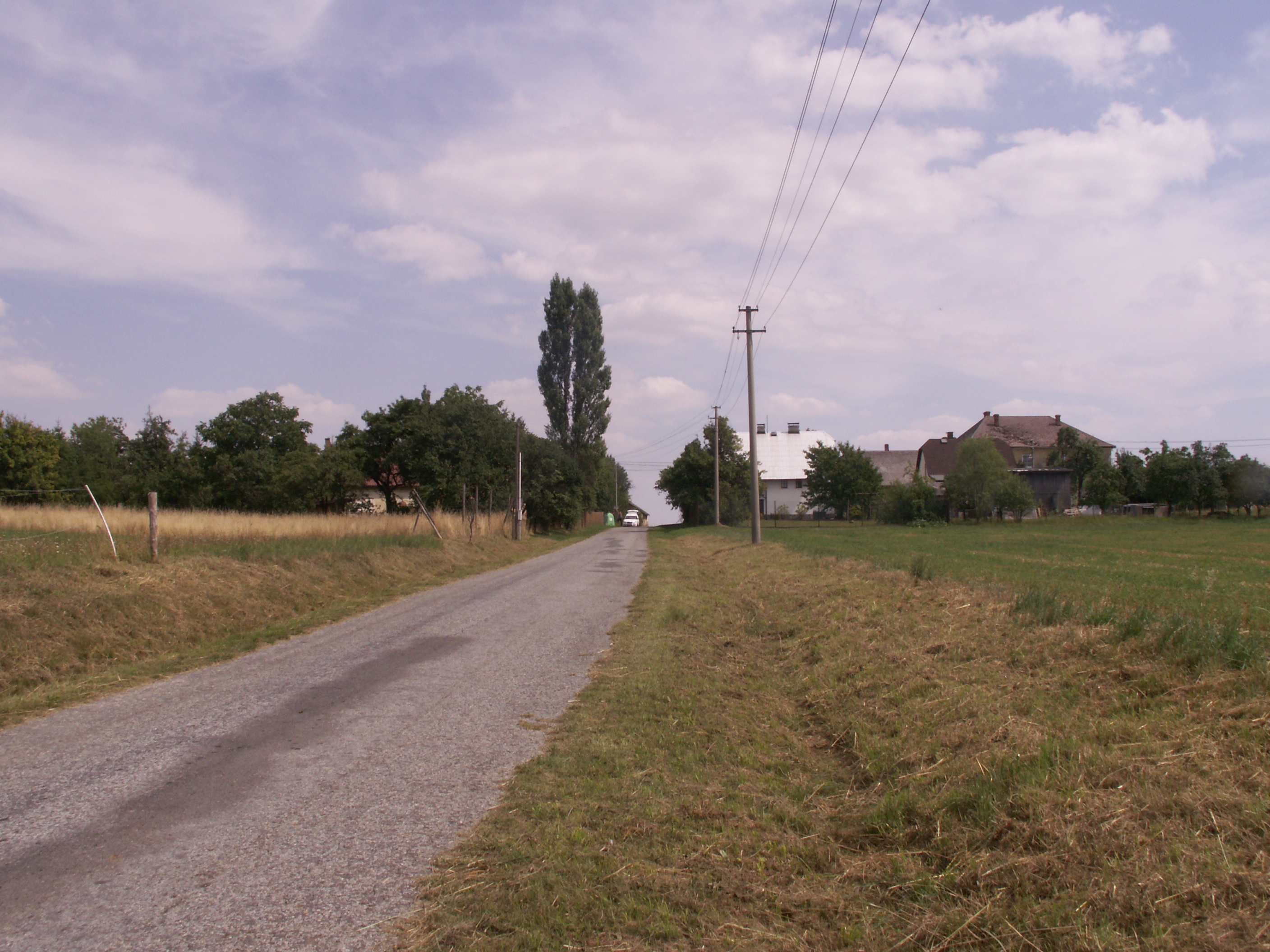 Kolnovice, část obce Mikulovice, okres Jeseník, část obce u kostela sv. Rocha